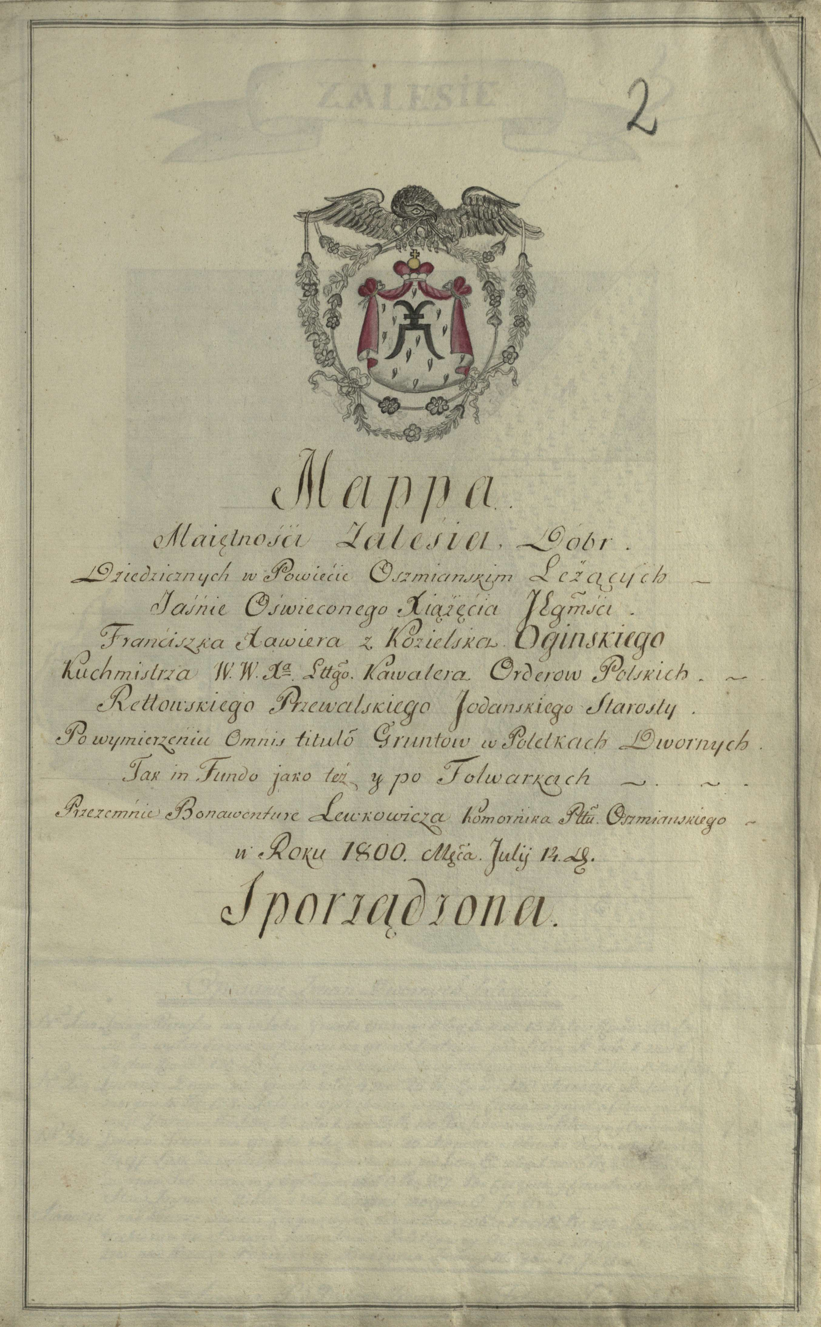 Беларуская (тарашкевіца): Вокладка інвэртару маёнтку Залесьсе (Zaleśsie) з гербам Агінскіх (Aginski)